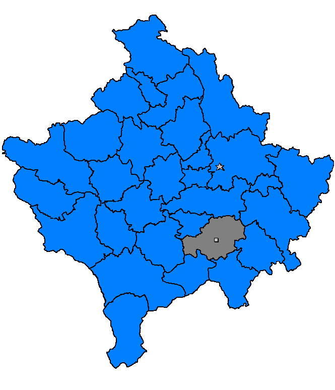 Ferizaj, Kosovë 2006